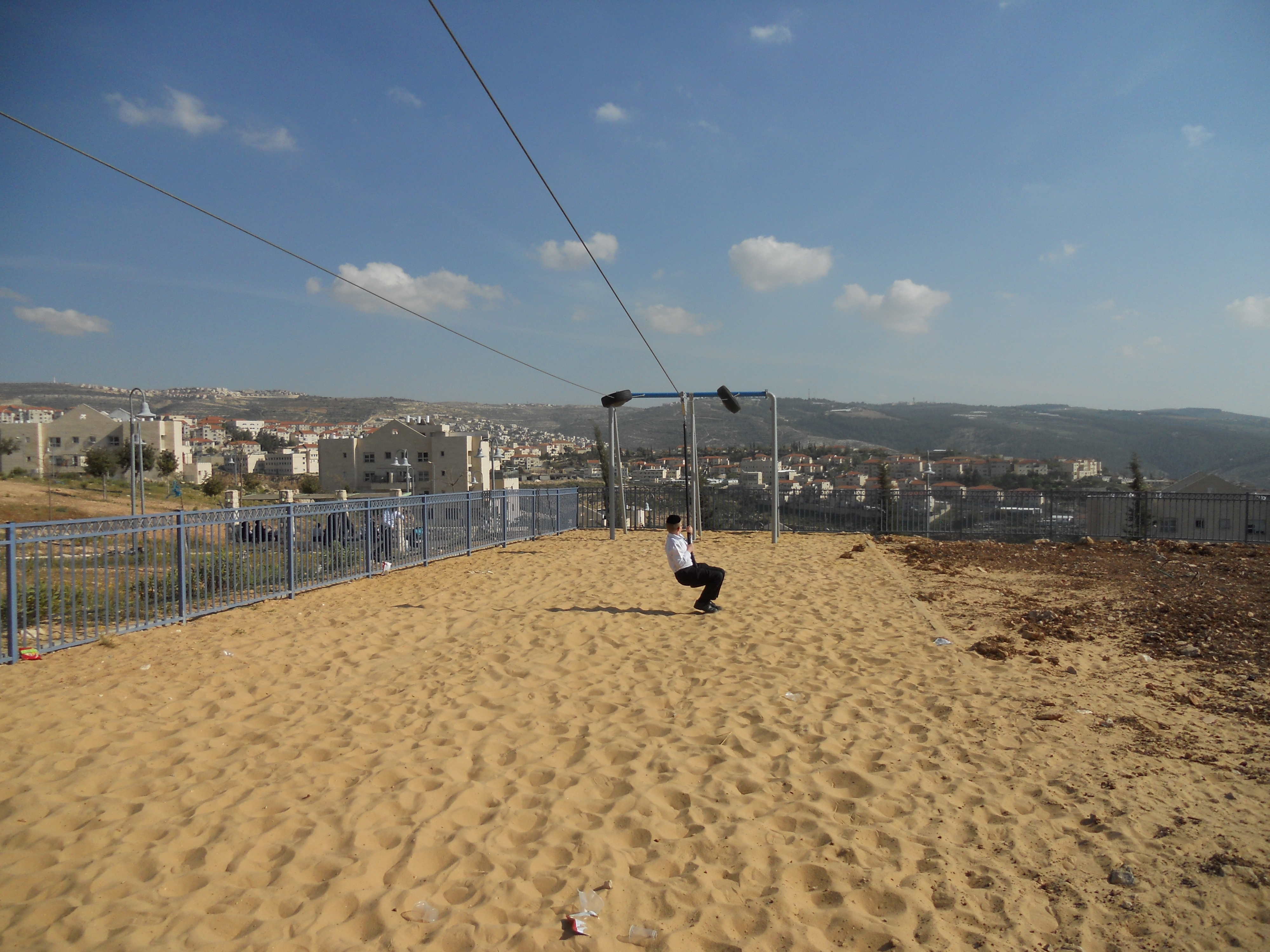 פארק שבעת המינים בביתר עילית בתמונה אומגה גלישה זוויתית